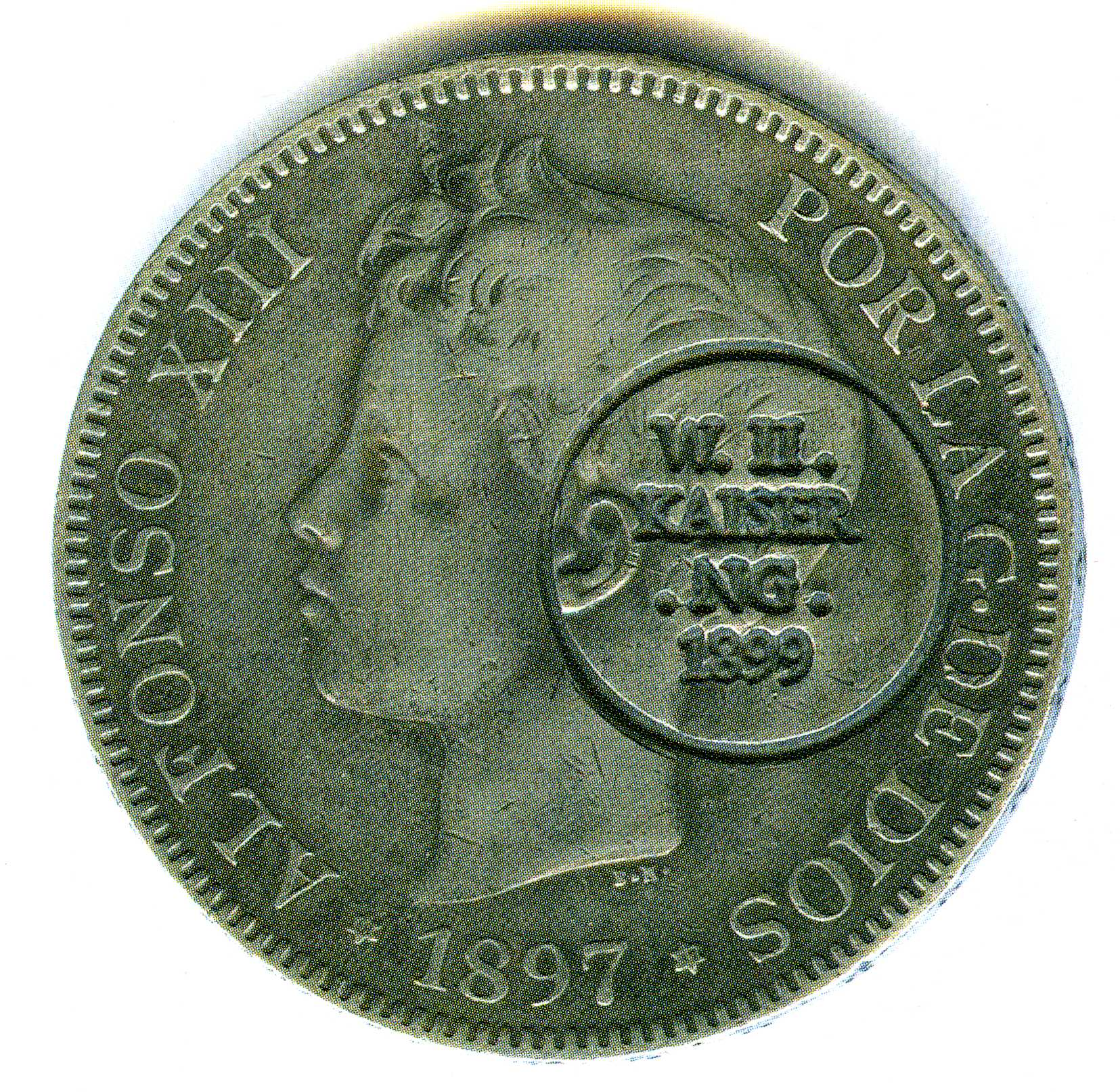 Moneda con resello de estrella para Nueva Guinea